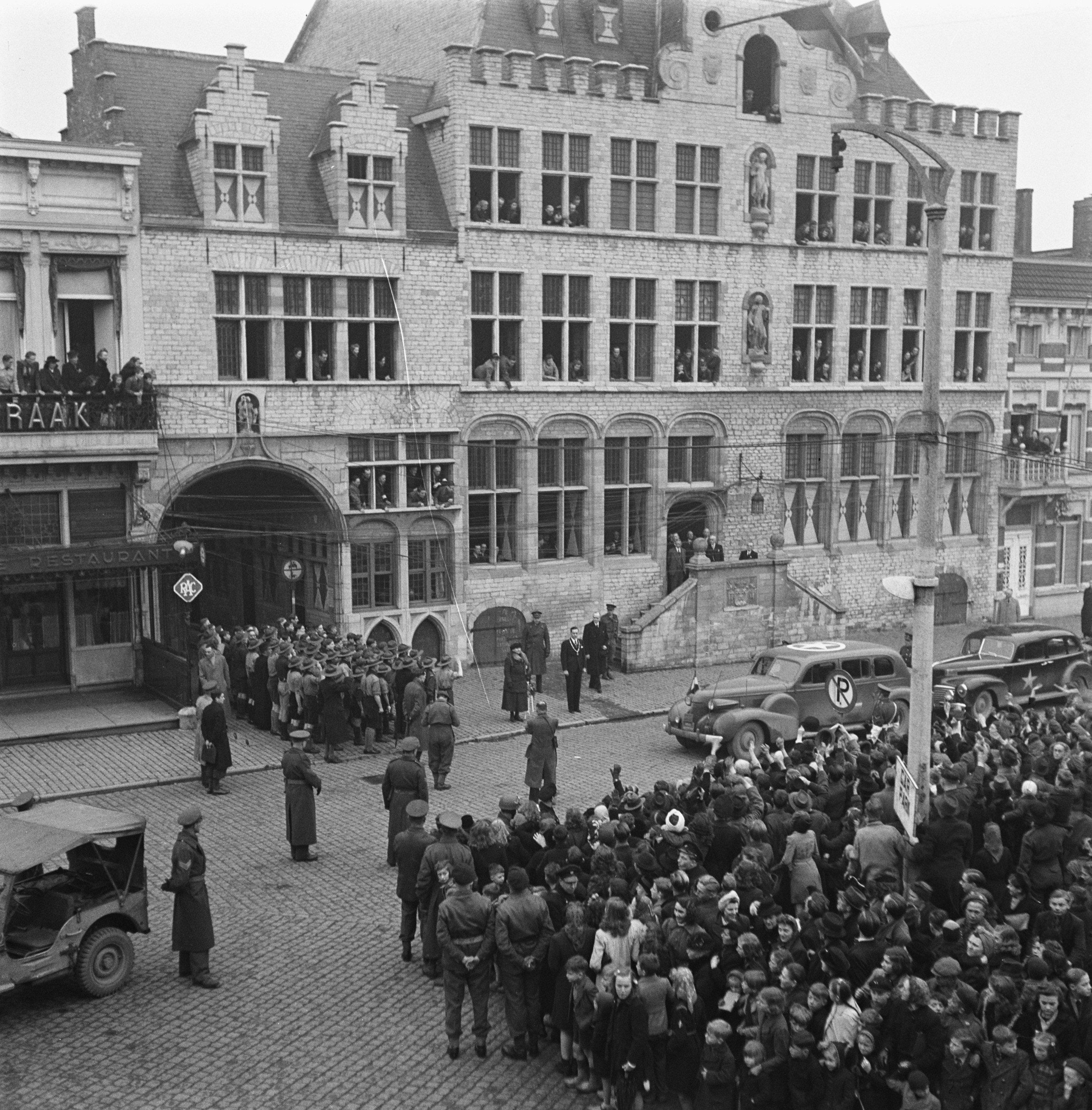 Collectie / Archief : Fotocollectie Anefo Reportage / Serie : Tocht van koningin Wilhelmina door bevrijd Zuid-Nederland (Zeeland, Brabant en Limburg) Beschrijving : Bergen op Zoom. Koningin Wilhelmina staat voor het stadhuis Annotatie : Links een groep padvinders. Naast haar burgemeester H.B.J. Witte (met ambtsketen) en waarnemend commissaris der koningin J.Th.M. Smits van Oyen Datum : 16 maart 1945 Locatie : Bergen op Zoom Trefwoorden : Bevrijdingsfeesten, tweede wereldoorlog Persoonsnaam : Wilhelmina (koningin Nederland) Fotograaf : Fotograaf Onbekend / Anefo Auteursrechthebbende : Nationaal Archief Materiaalsoort : Negatief (zwart/wit) Nummer archiefinventaris : bekijk toegang 2.24.01.03 Bestanddeelnummer : 900-4090